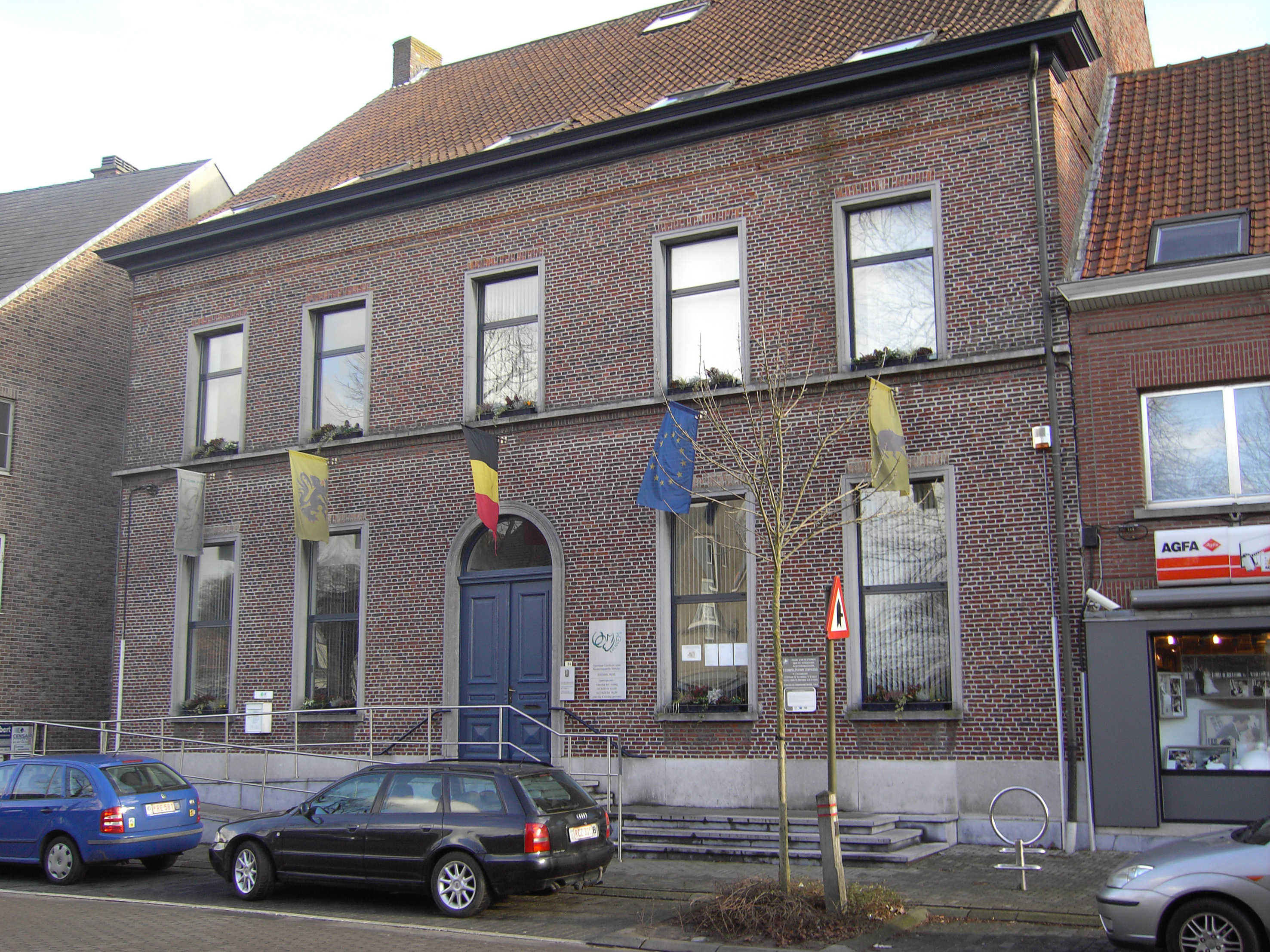 Sleidinge in Evergem in Belgium - Former Town hall (1825) - Now OCMW-office Evergem